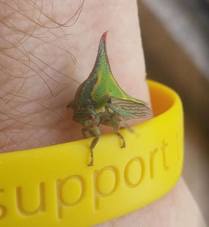 Umbonia spinosa (Bicho espino) - Thorn treehopper